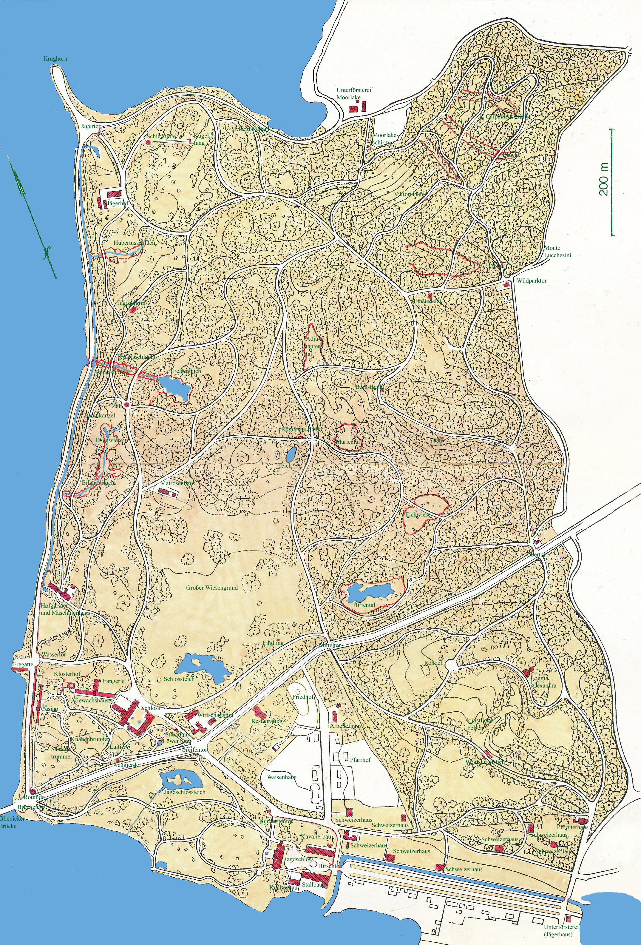 Klein Glienicke Parkübersichtsplan, Zustand 1875, auf Grundlage der bei Hermann Jäger, Gartenkunst und Gärten einst und jetzt, Berlin 1888 veröffentlichten Karte